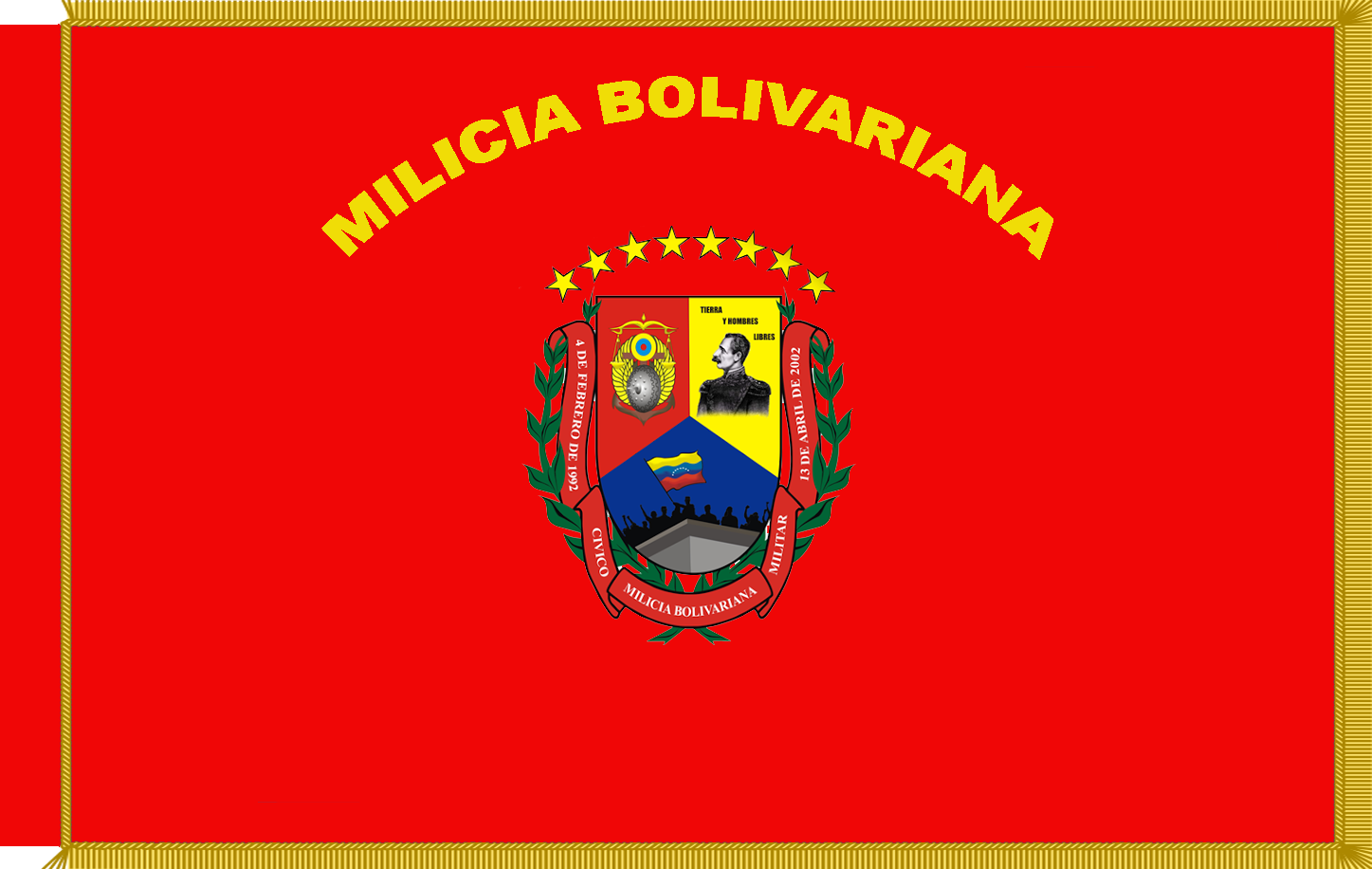 Hecho por Soy Socialista